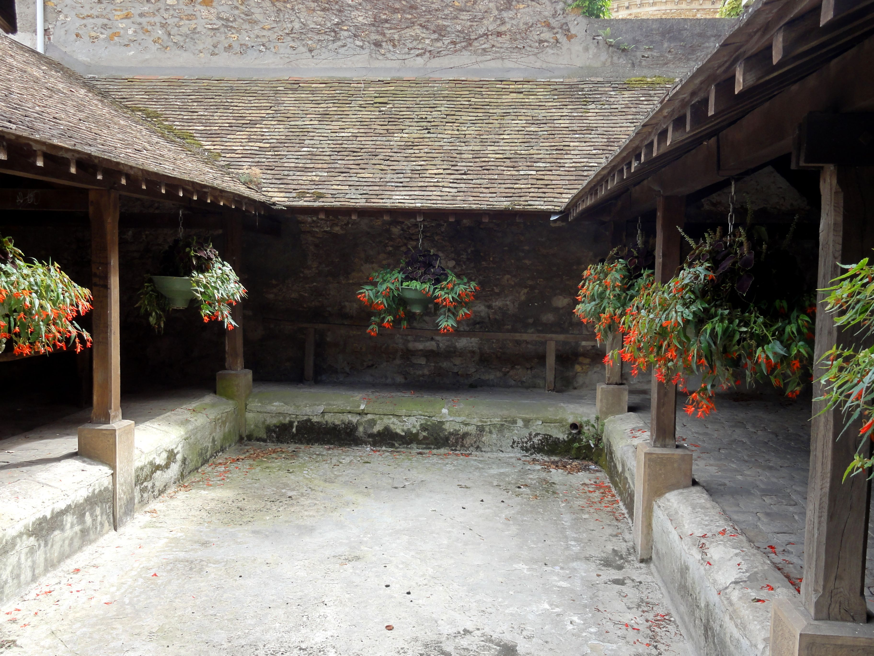 Lavoir, rue du docteur Darrier.